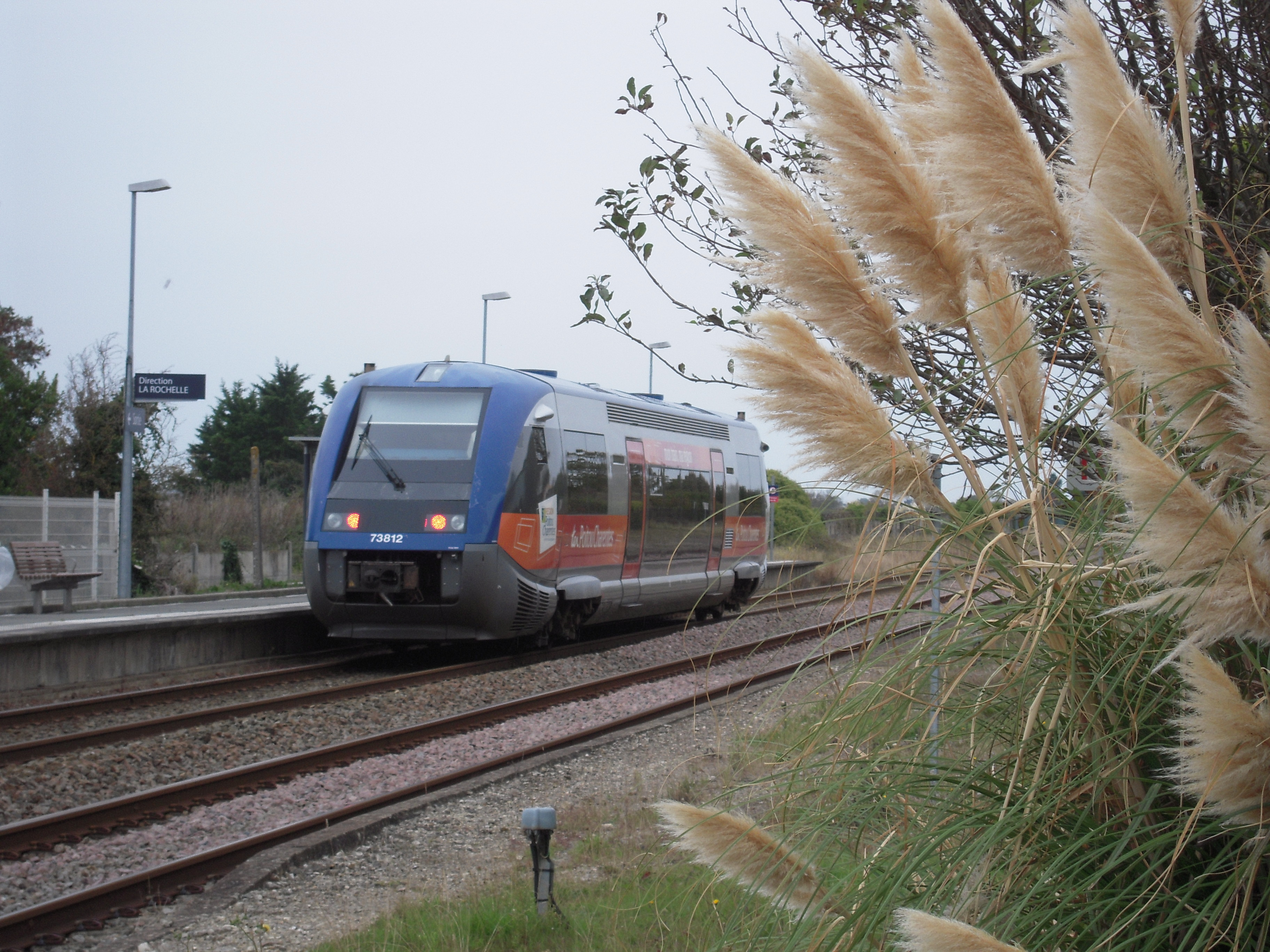 La halte ferroviaire d'Angoulins-sur-Mer a pu de nouveau être ouverte au trafic voyageurs en septembre 2007 ; sa fréquentation s'est accrue sensiblement, depuis la mise en place d'une liaison interurbaine cadencée entre La Rochelle et Rochefort. Le X 73812 a été mis en service le 31 août 2004.